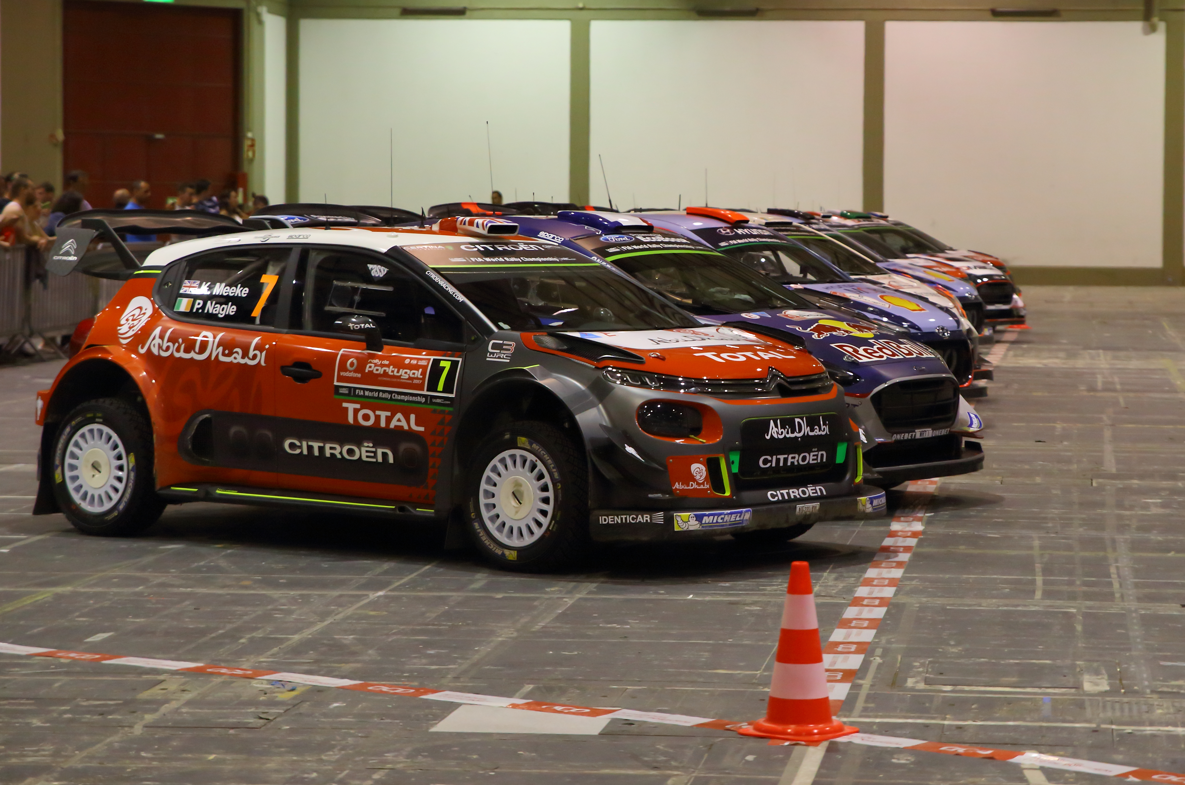 2017 Rally de Portugal